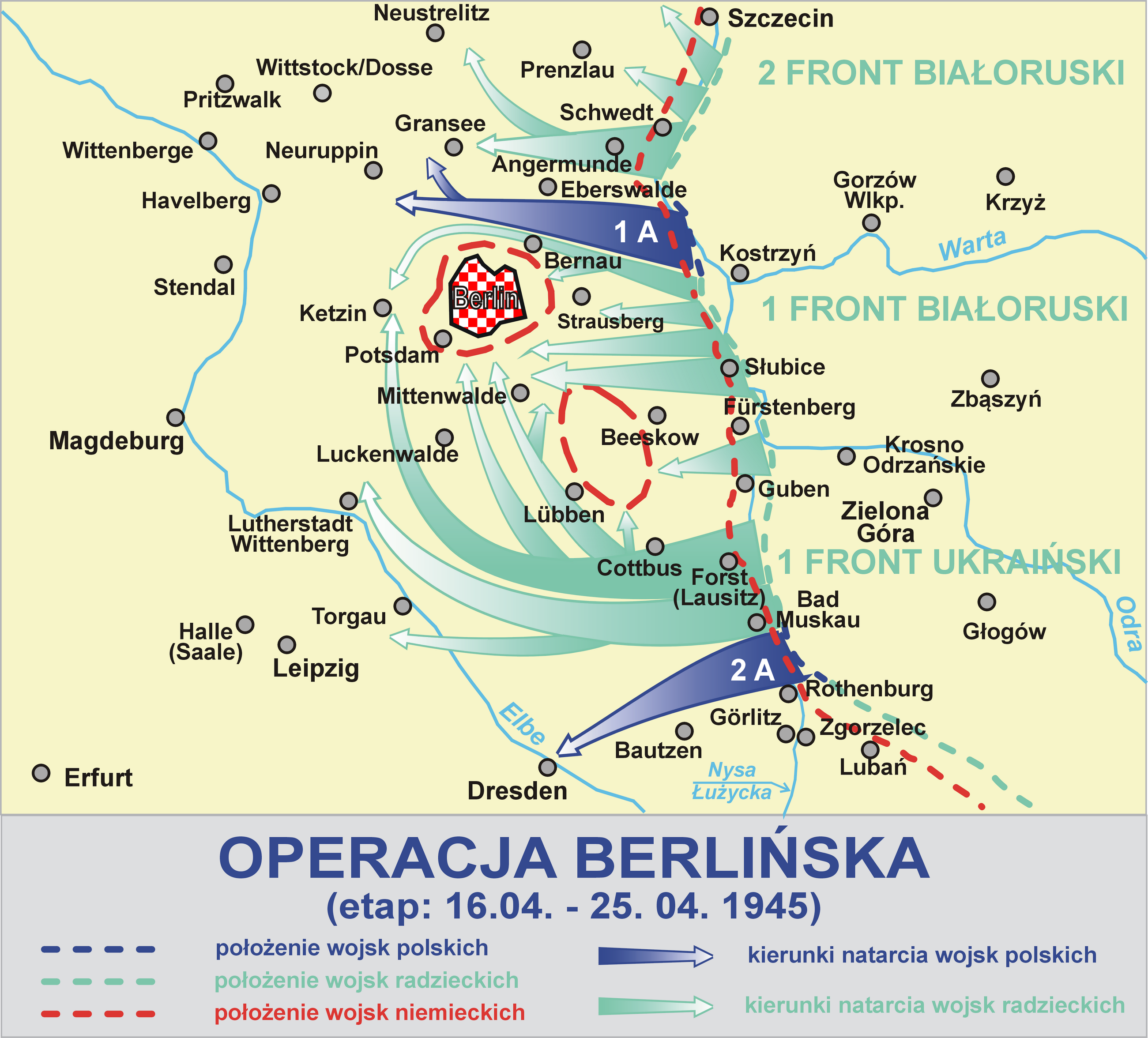 Operacja berlińska - etap 16-25.04.1945